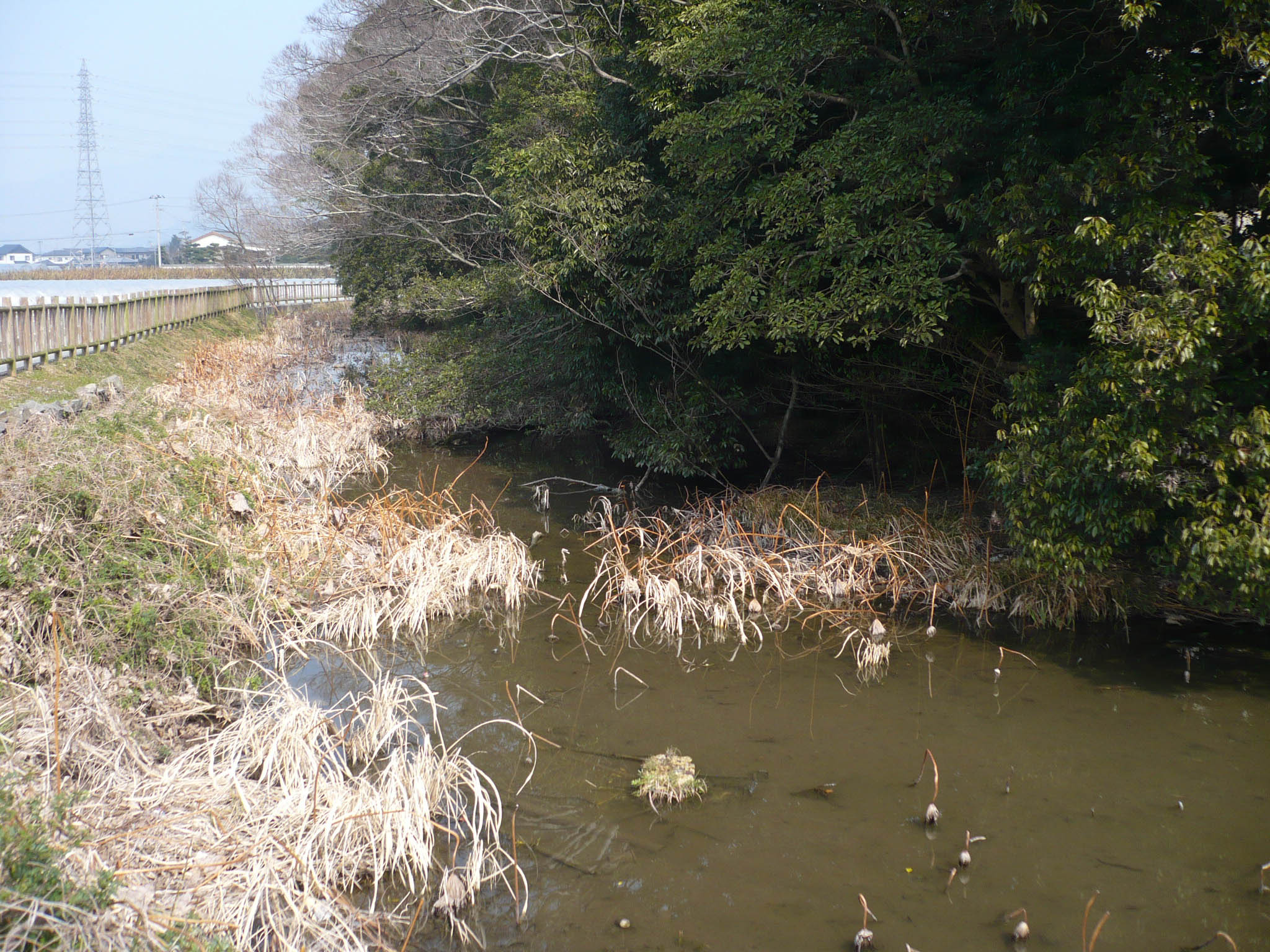 堀跡